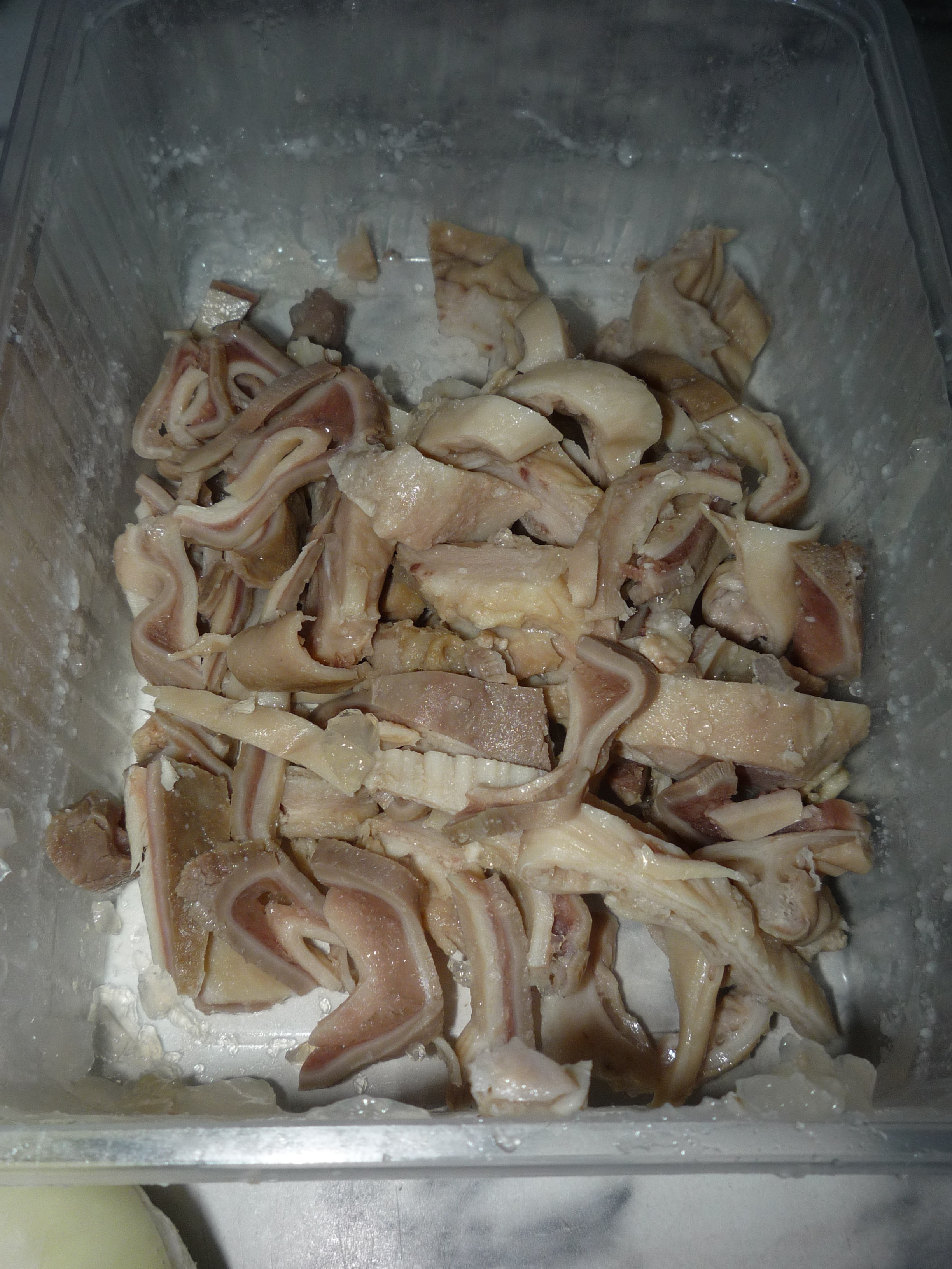 Autor fotografie a videa Jiří Zelenka. Dršťková polévka z vepřových žaludků (krok za krokem). Postup je stejný jako u polévky z hovězích drštěk.